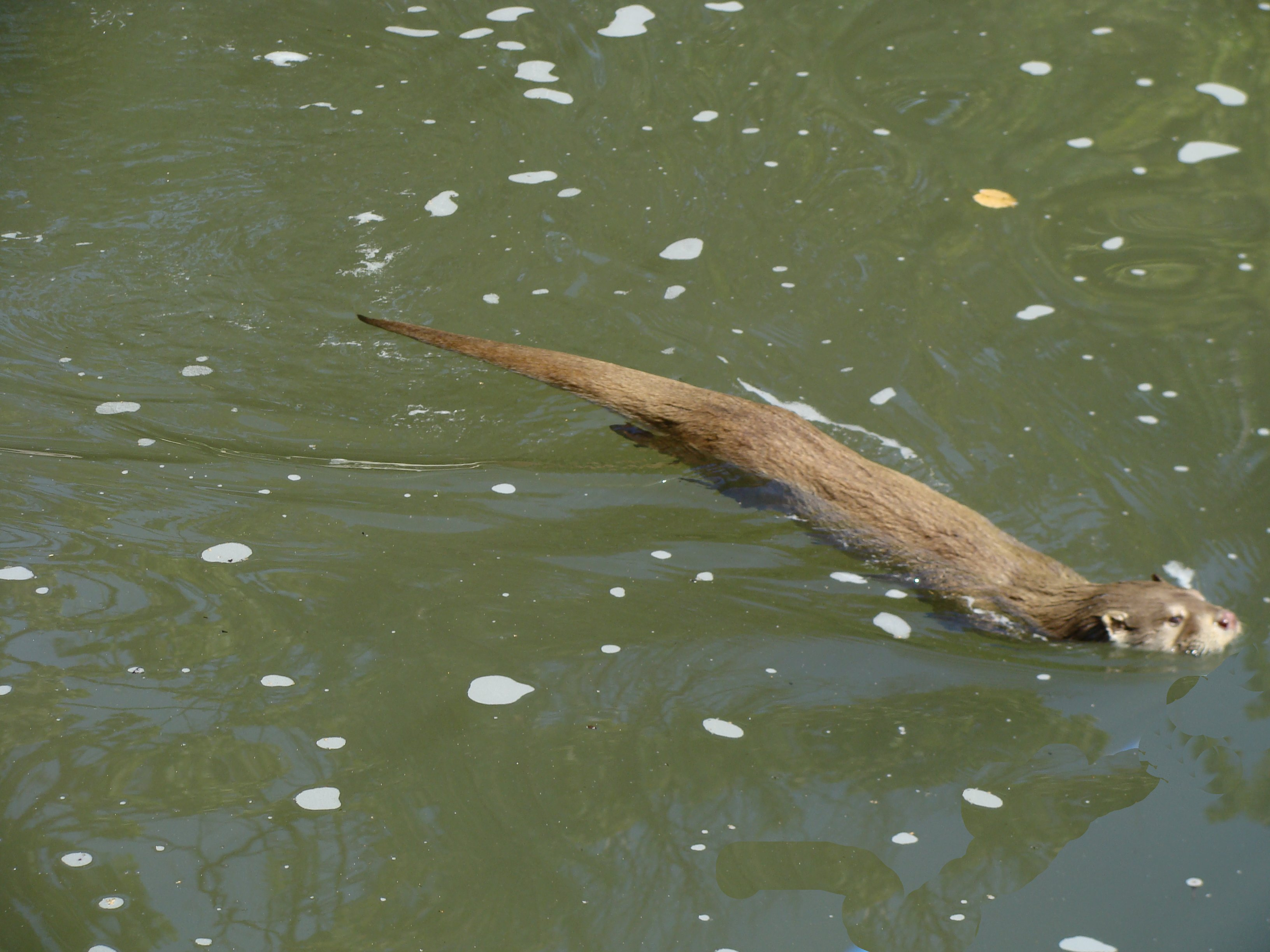 Płynąca wydra Lutra lutra